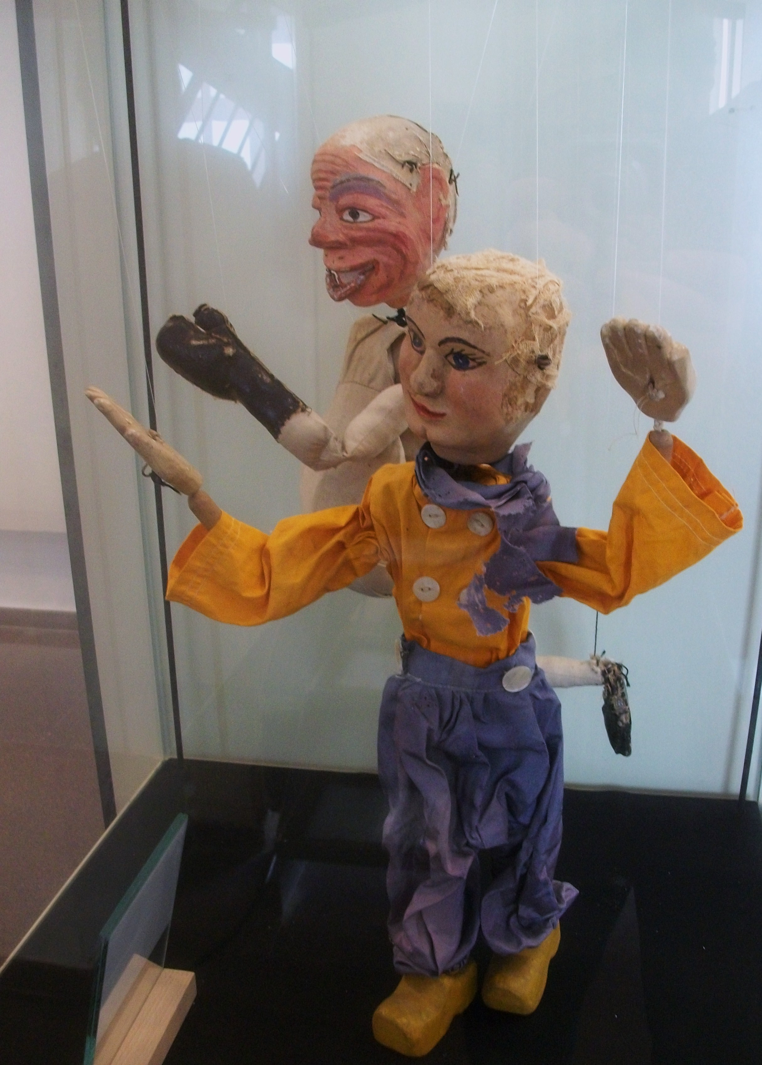 Marionetes de fils, Nova York 1930, Museu Internacional de Titelles d'Albaida (MITA).